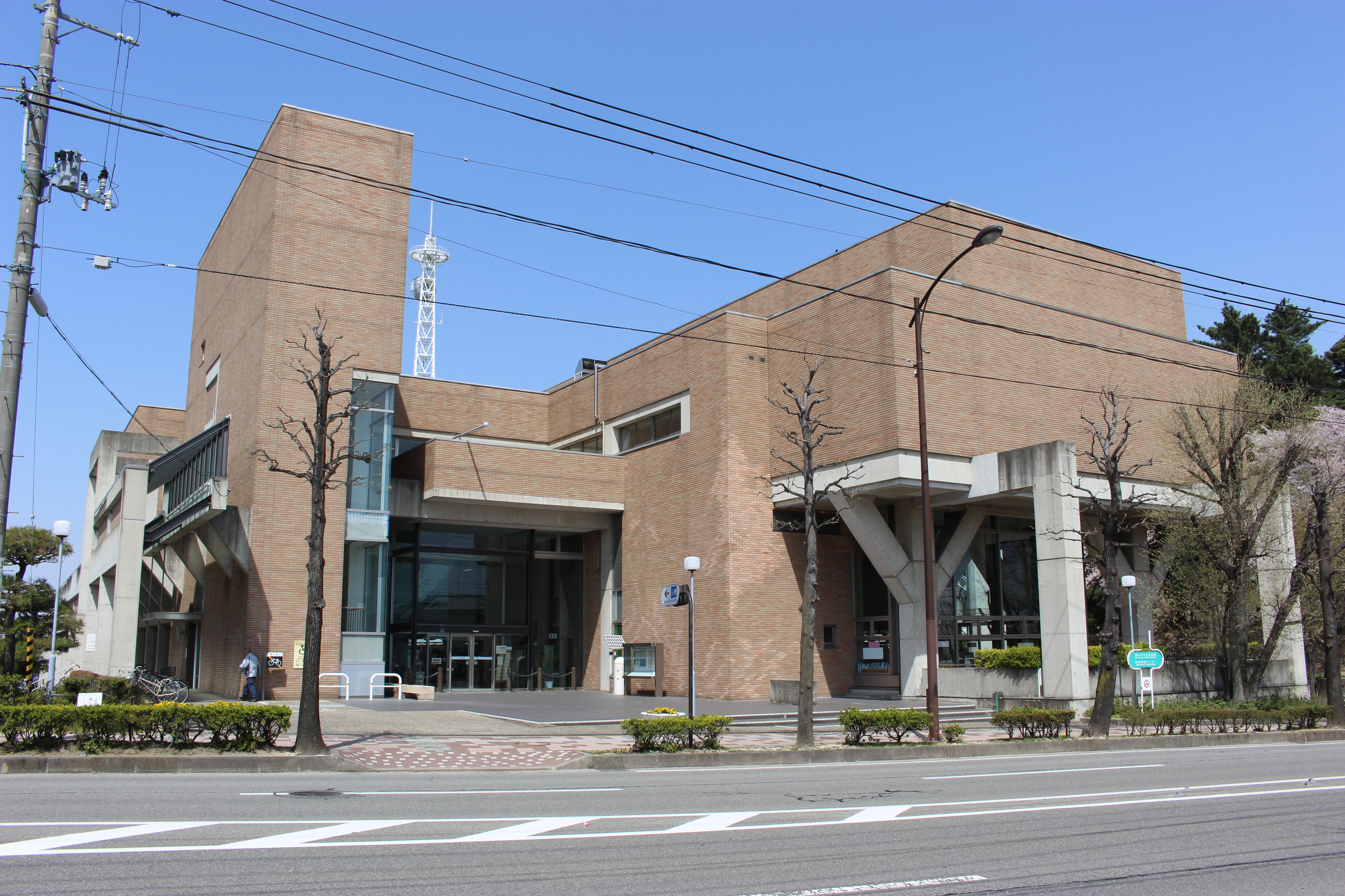 郡山市中央図書館